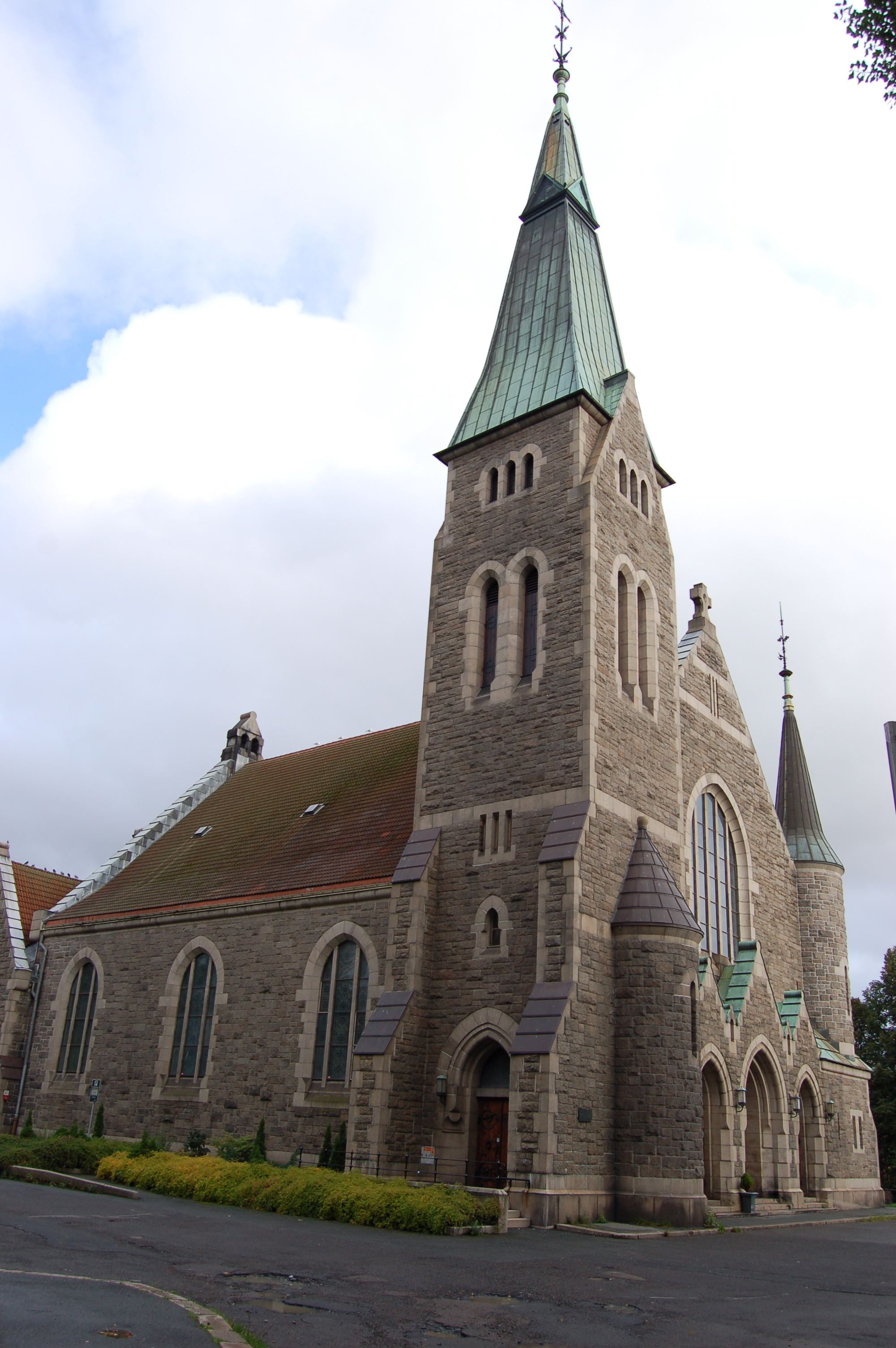 Fagerborg kirke i Oslo, Fagerborg church in Oslo